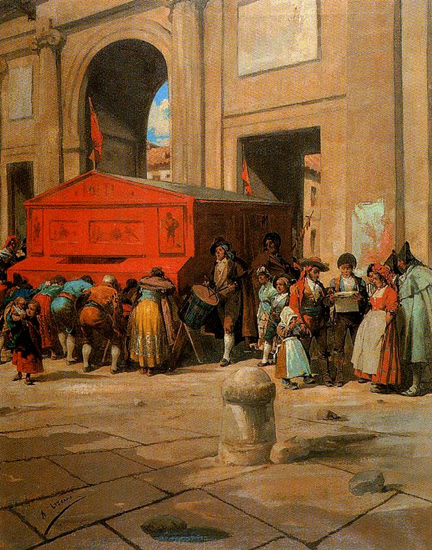 'Titirimundi'. Óleo sobre lienzo. 78 x 60 cm